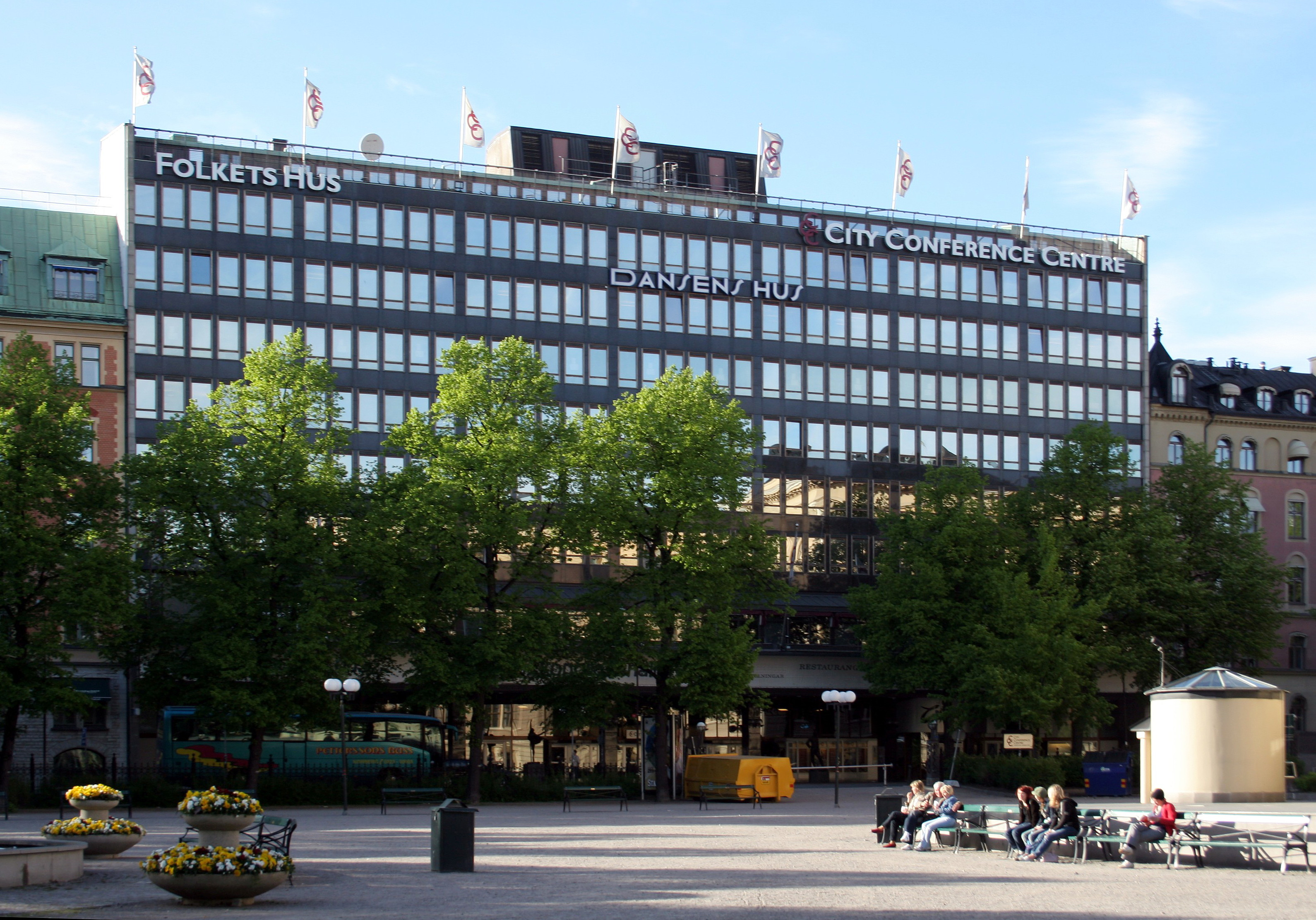 Folkets hus, Stockholm, Sweden.